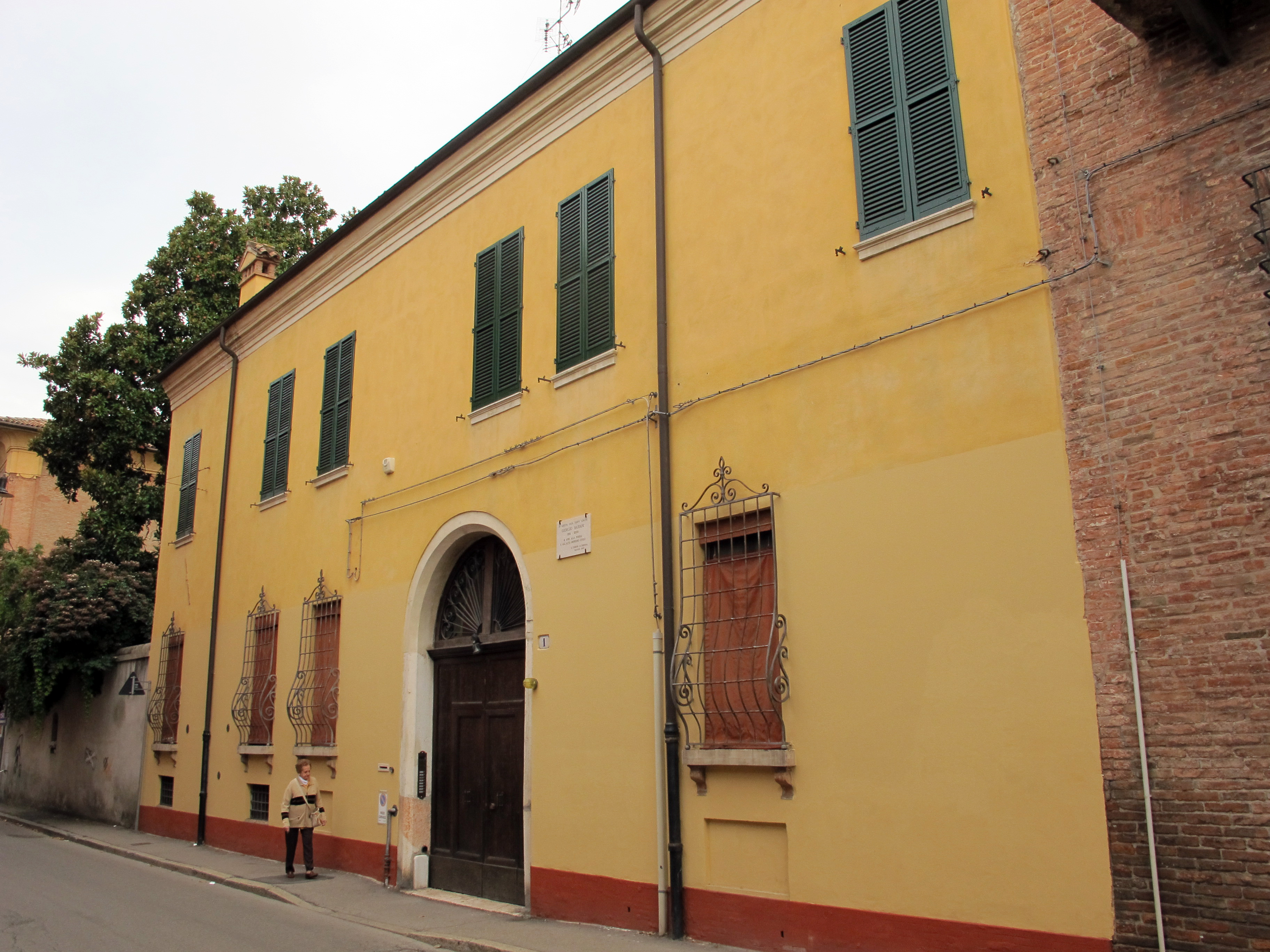 Ferrara